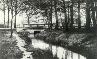 La Molette rivière (maintenant souterraine) séparant Drancy et le Blanc-Mesnil